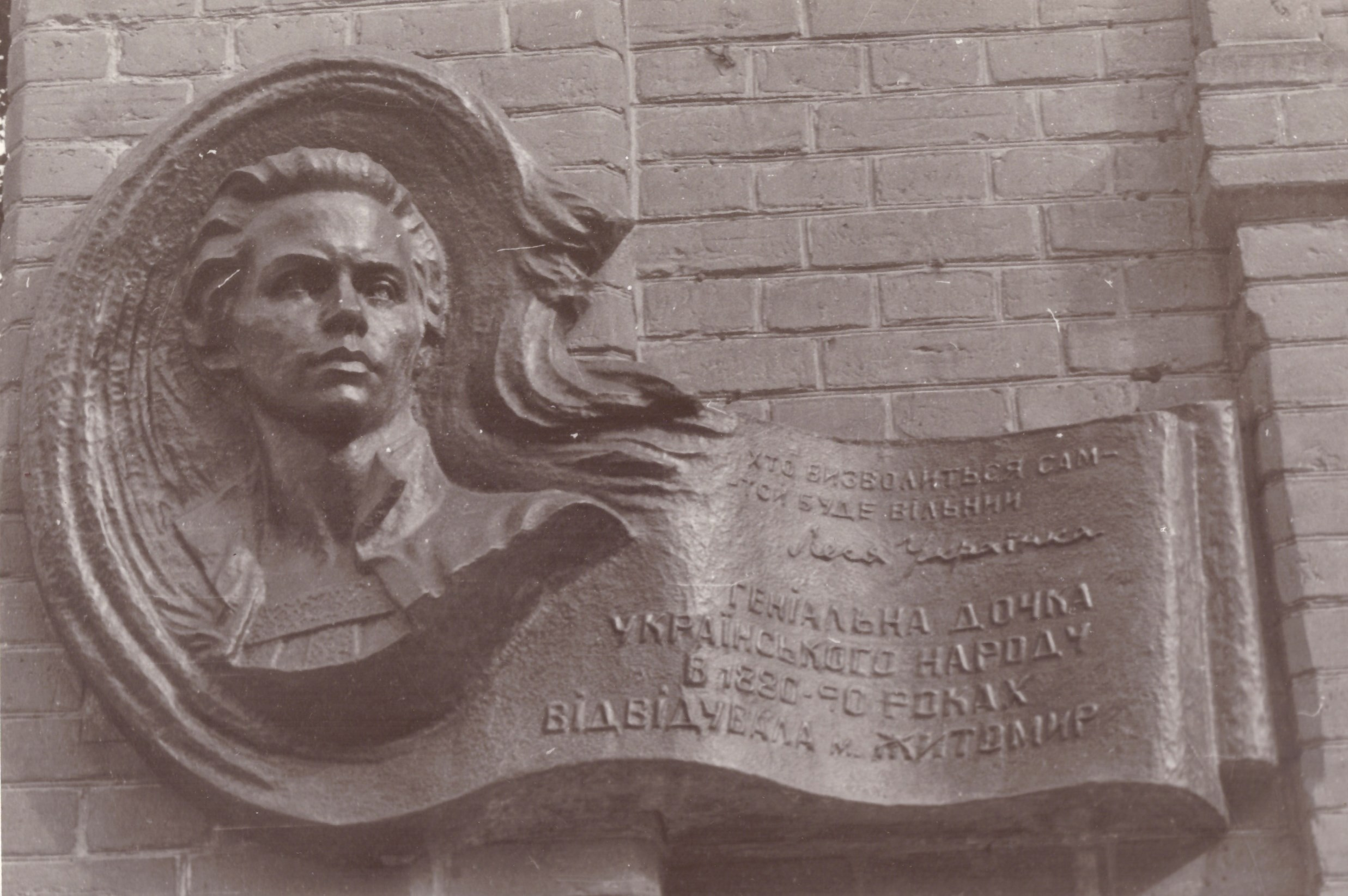 Леся Українка. М. Житомир Житомирська область. 1997. Скульптор Таранченко В.О. Меморіальна дошка. Мідь карбована. 95 х 140 х 27.